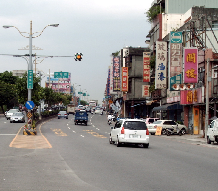 桃園縣中壢市內壢崁子腳。